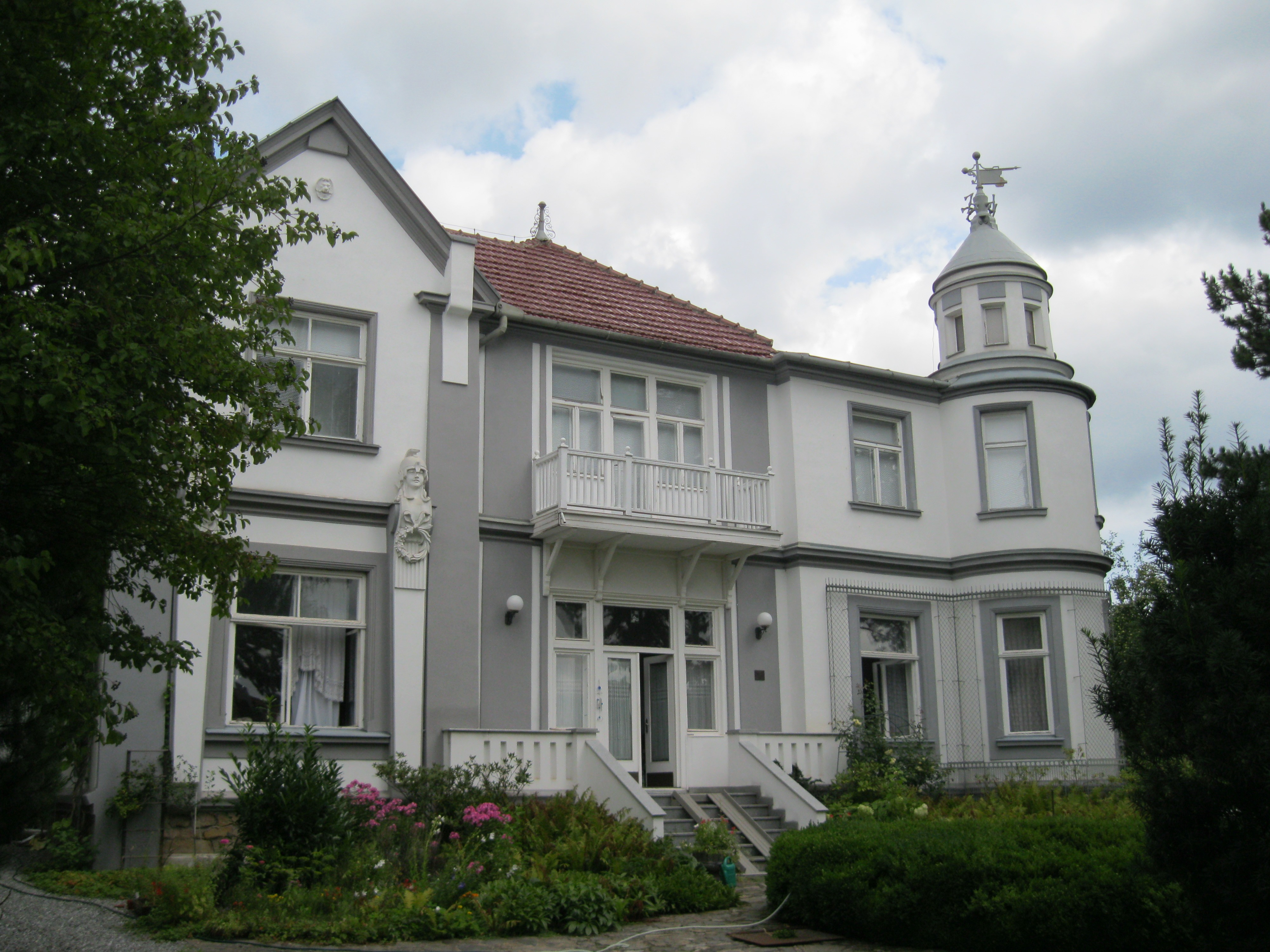 vila zv. Franke (Tišnov), Riegrova 281, Tišnov, Tišnov.